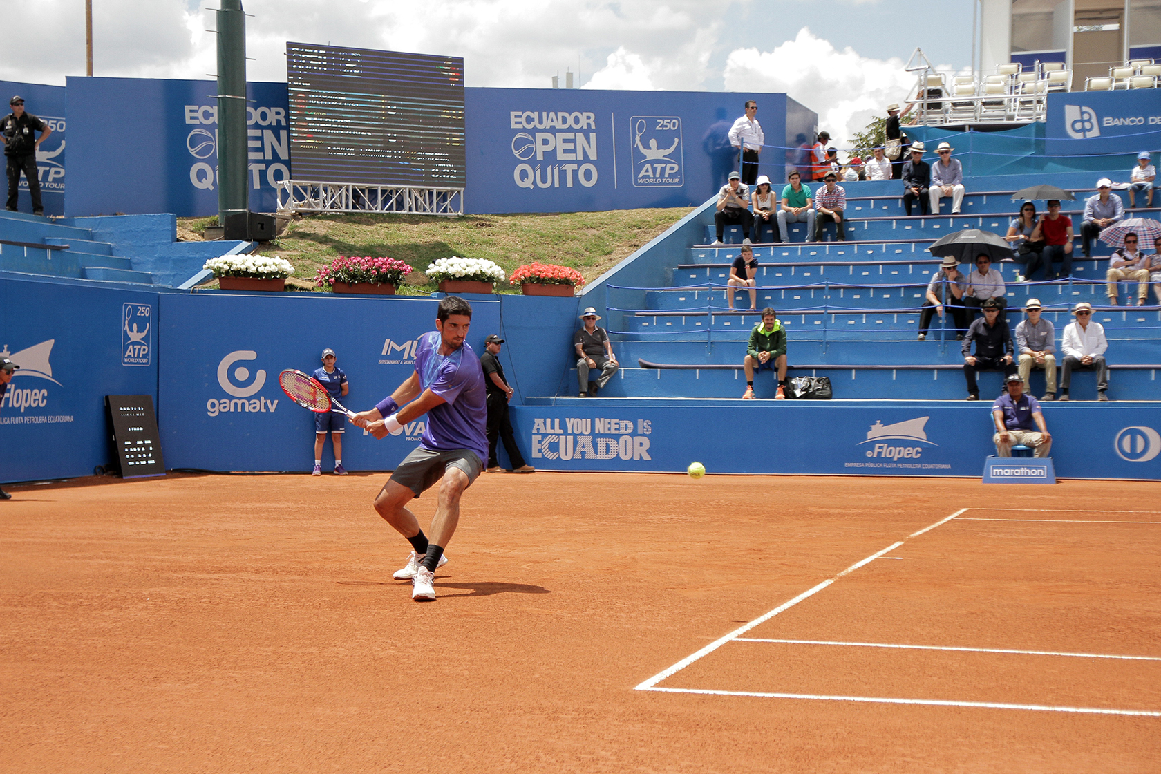 Quito, Tenistas Thomas Belucci (Violeta9 y Albert Montañes (Rojo) juegan en los cuartos de final del ATP 250. Fotografías: Carlos Rodríguez/ANDES.